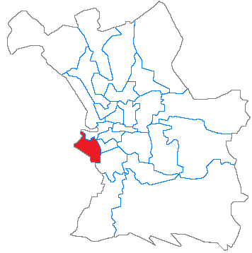 Situation du canton dans la ville de Marseille